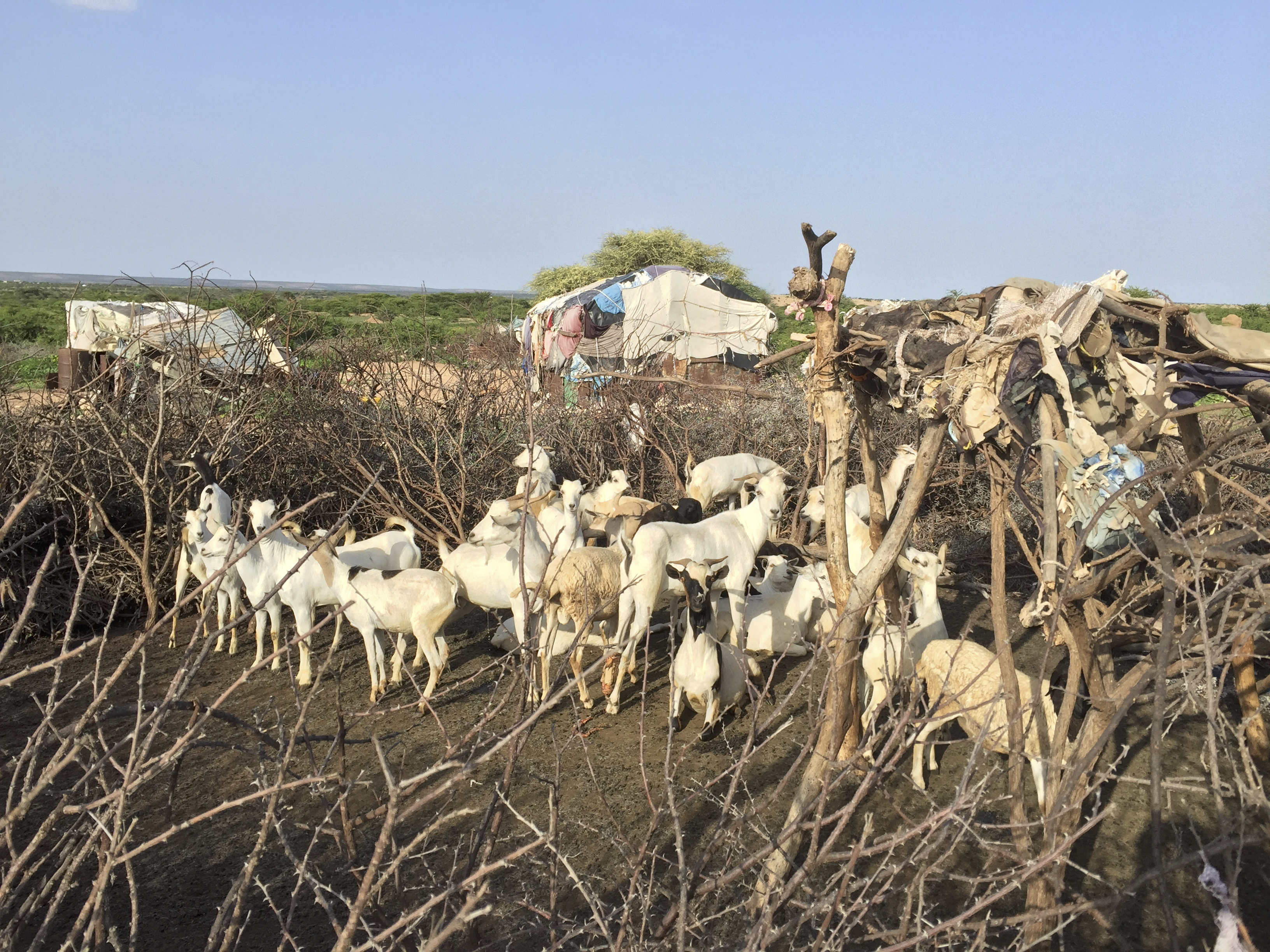 Near Hargeisa, Somaliland